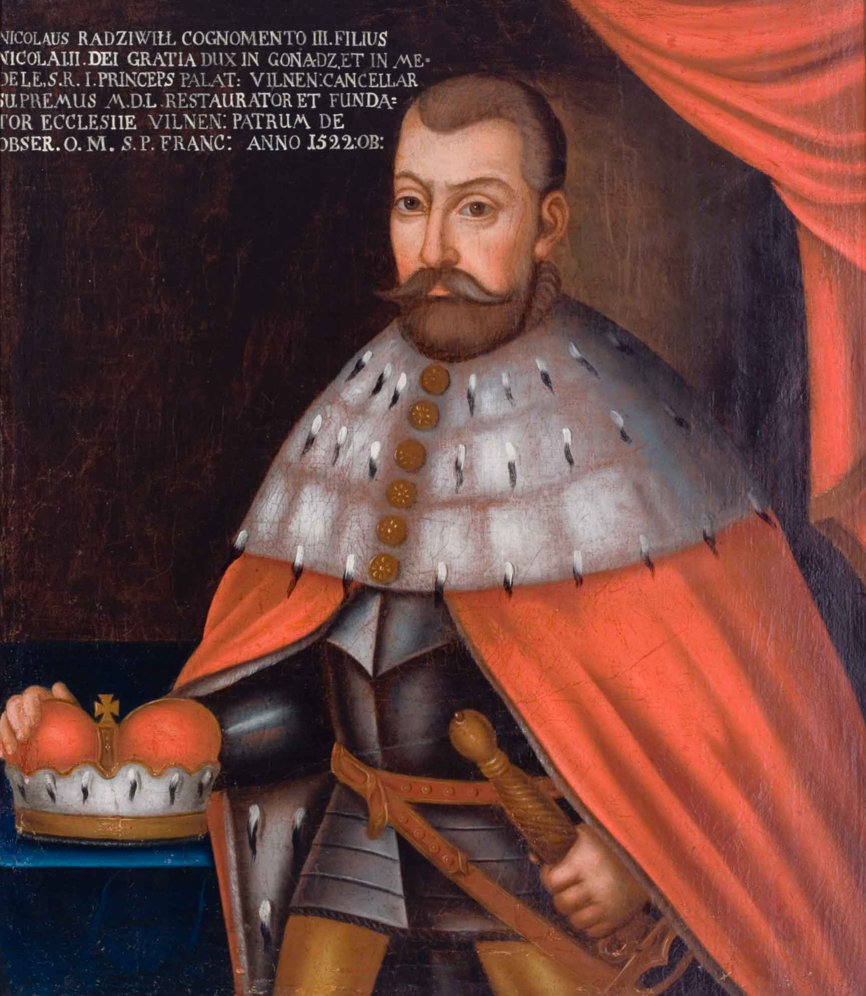 Беларуская (тарашкевіца): Партрэт Мікалая Радзівіла «Амора» (Mikałaj Radzivił «Amor»)